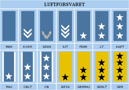 Luftforsvarets gradbetegnelser